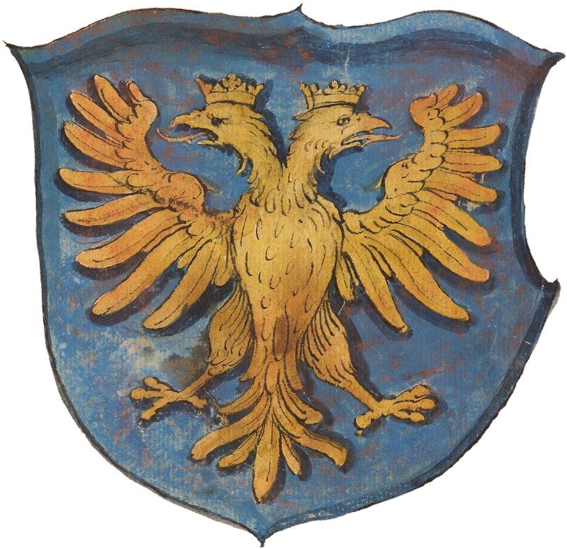 Герб Перемышльской земли Речи Посполитой